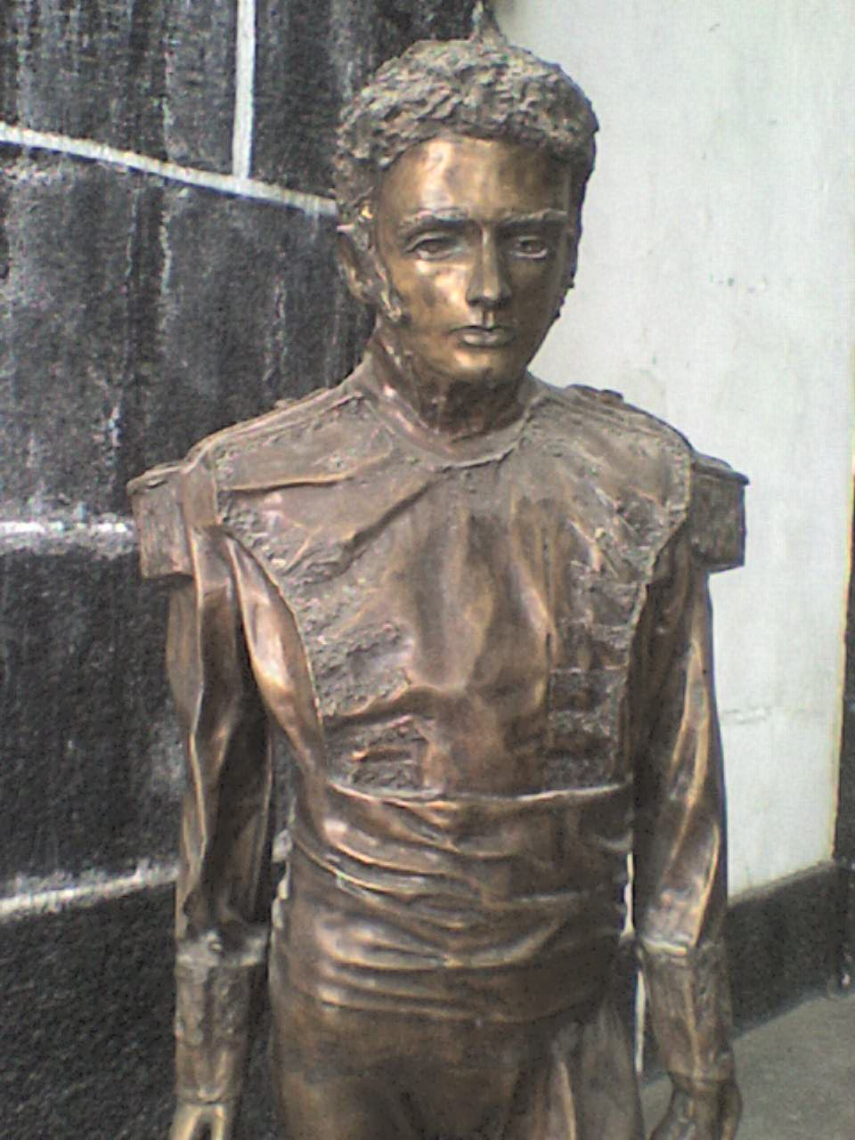 Estatua en bronce del general Guadalupe Victoria del Fuerte de San Carlos en Perote, Veracruz.